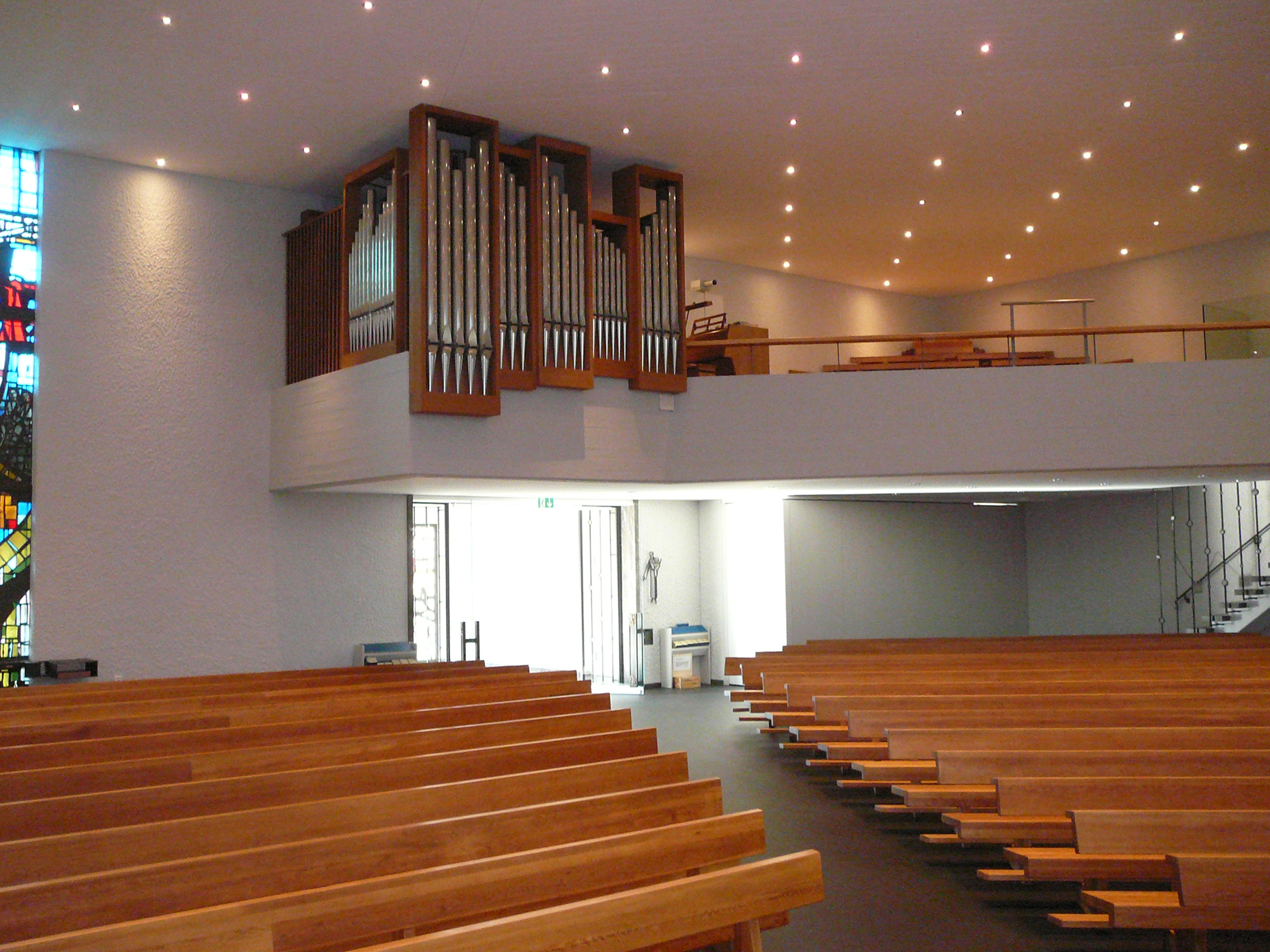 Römisch-katholische Pfarrkirche Bruder Klaus Urdorf, Blick zur Orgelempore